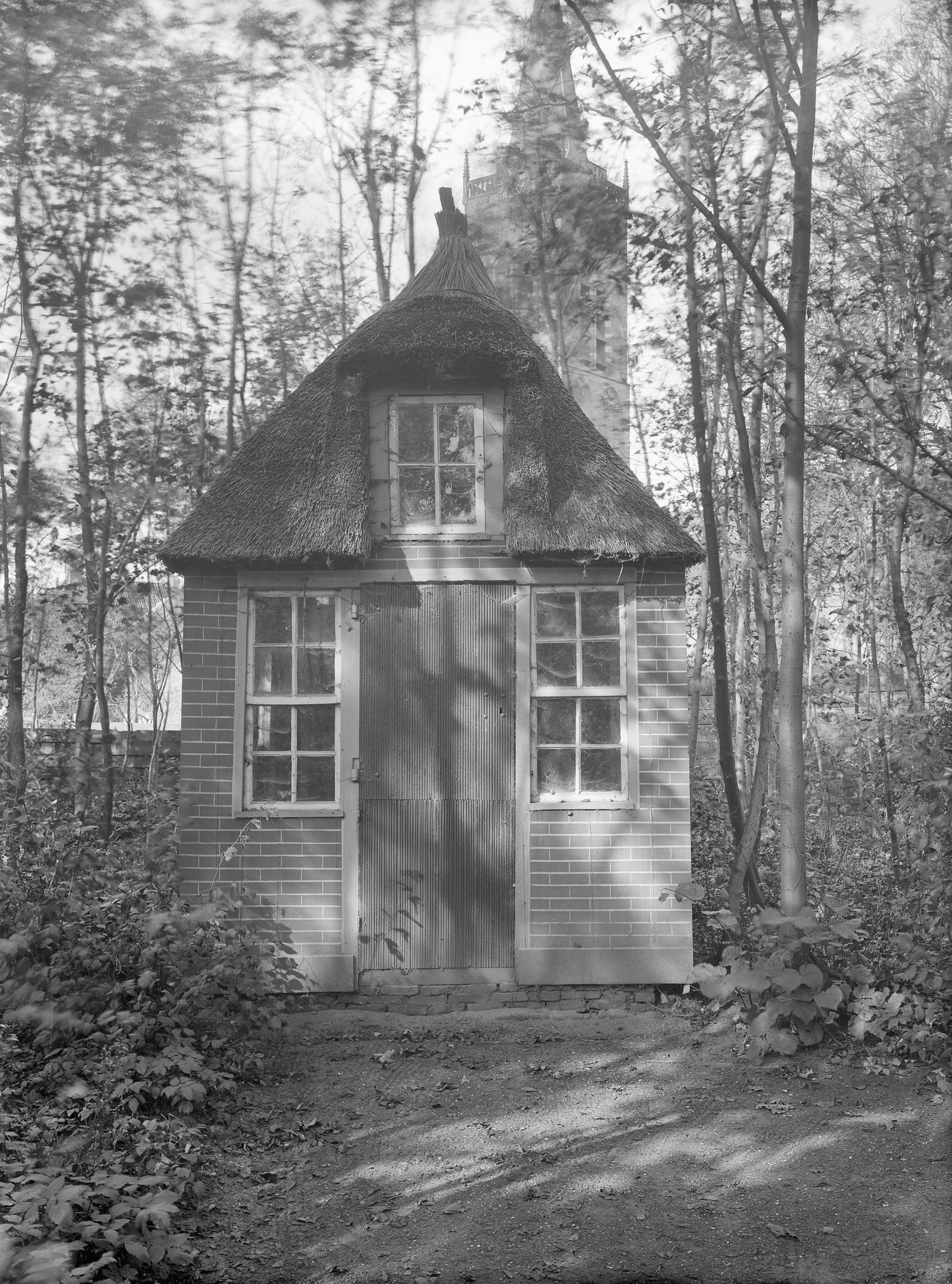 Tuinhuisje v.Aagje Wolff en Betje Deken: theehuisje van Aagje Wolff en Betje Deken This is a possible Rijksmonument:Find the monument in the Monuments database:in BeverwijkAll Rijksmonumenten in BeverwijkIs this a Rijksmonument?YesNoMore information about this project and help. More images to work at in Category:Possible Rijksmonumenten.